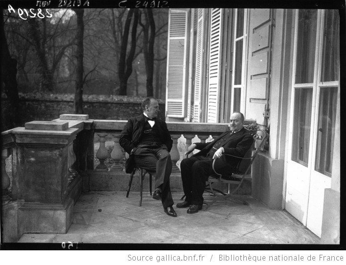 Rakovski y Chicherin en la embajada soviética en París en 1925.